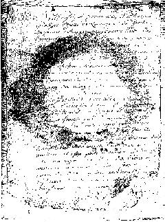 Butterhoffen